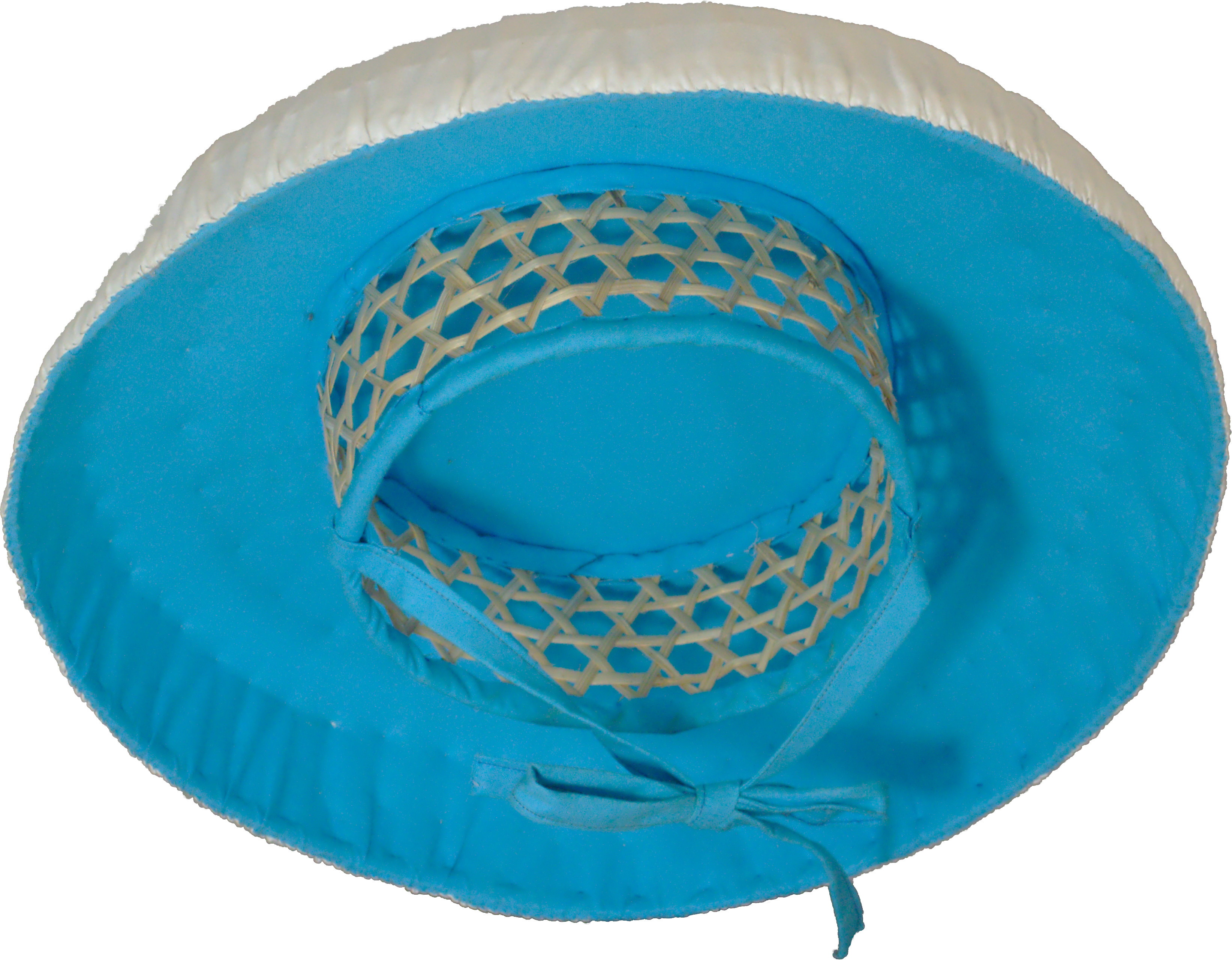 Le Salako est un chapeau traditionnellement porté par les anciens pêcheurs saintois et encore fabriqué artisanalement à Terre-de-Bas. Dans les boutiques de souvenirs, le tissu «madras» a remplacé les couleurs traditionnelles, présentes ici, sur mon propre salako, fabriqué en 2017.